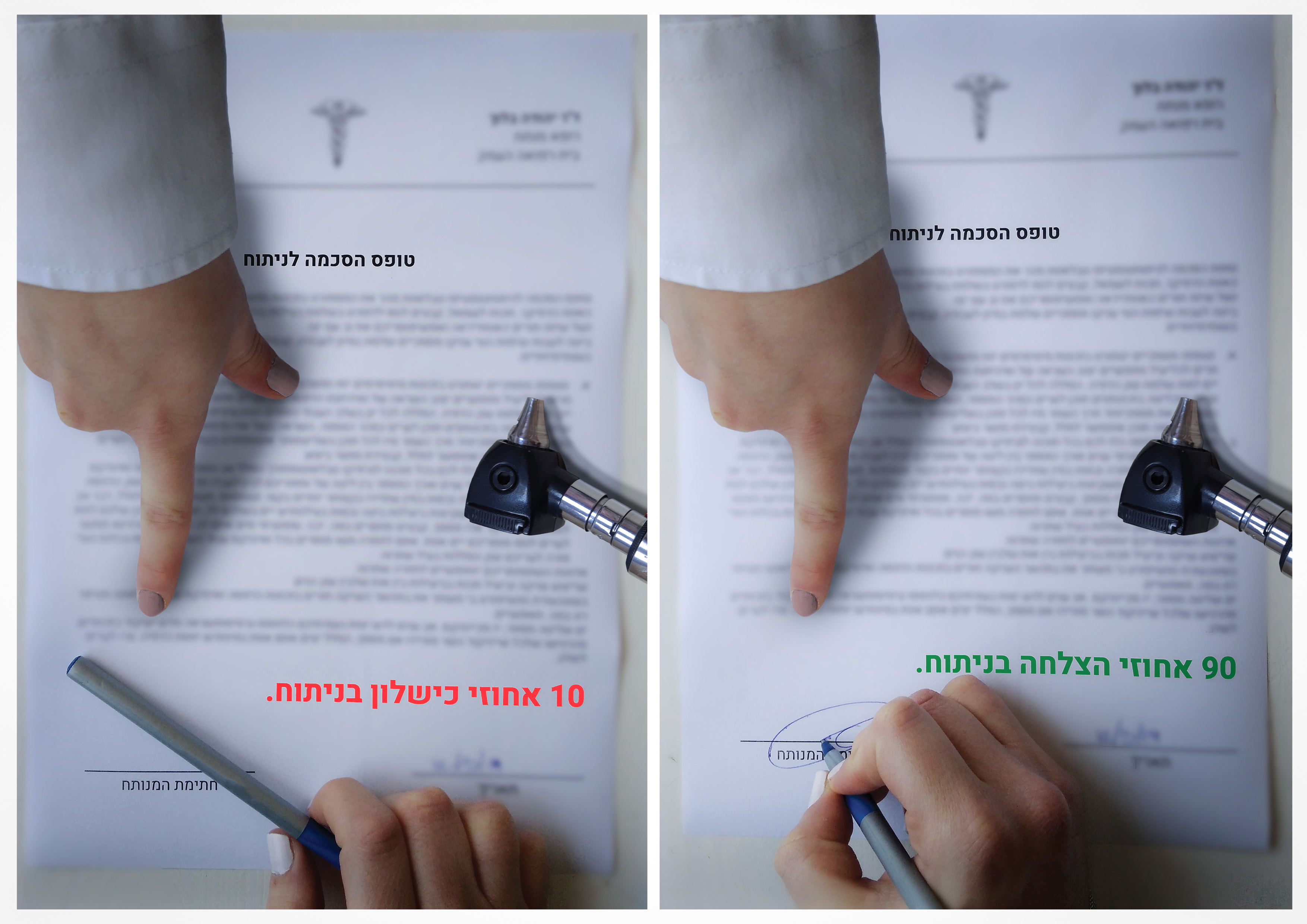 אפקט המסגור אילוסטרציה